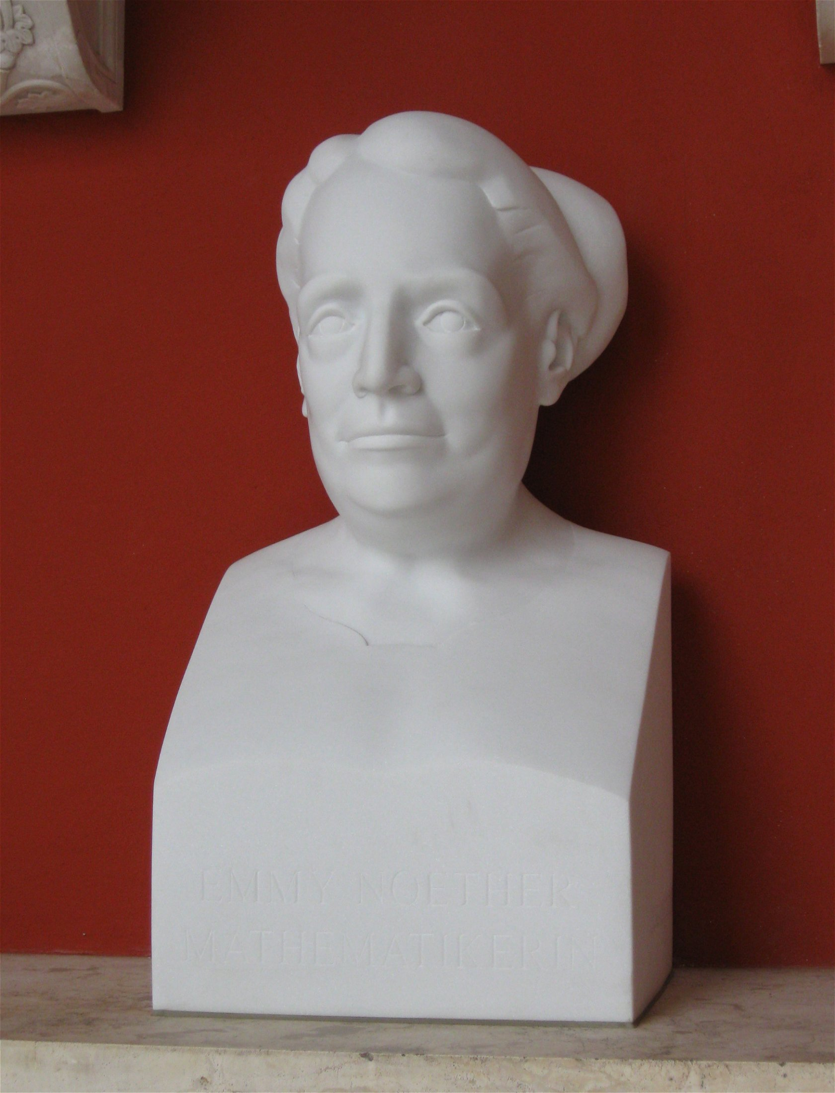 Ruhmeshalle München: Emmy Noether Mathematikerin (im Jahre 2009 neu aufgestellt)